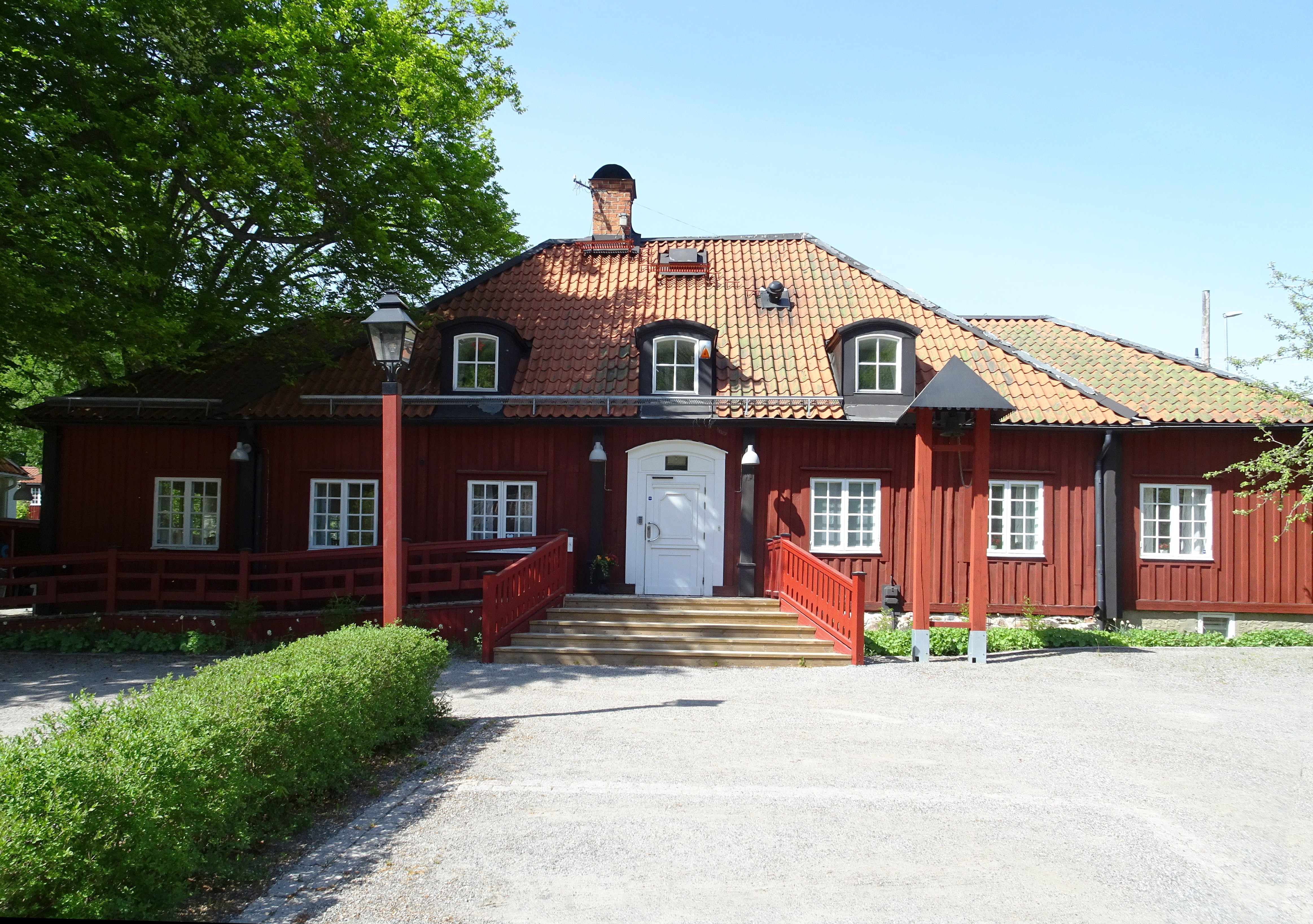 Tullinge gård, norra yttre flygeln (Adler Salviuspaviljongen, församlingshem)